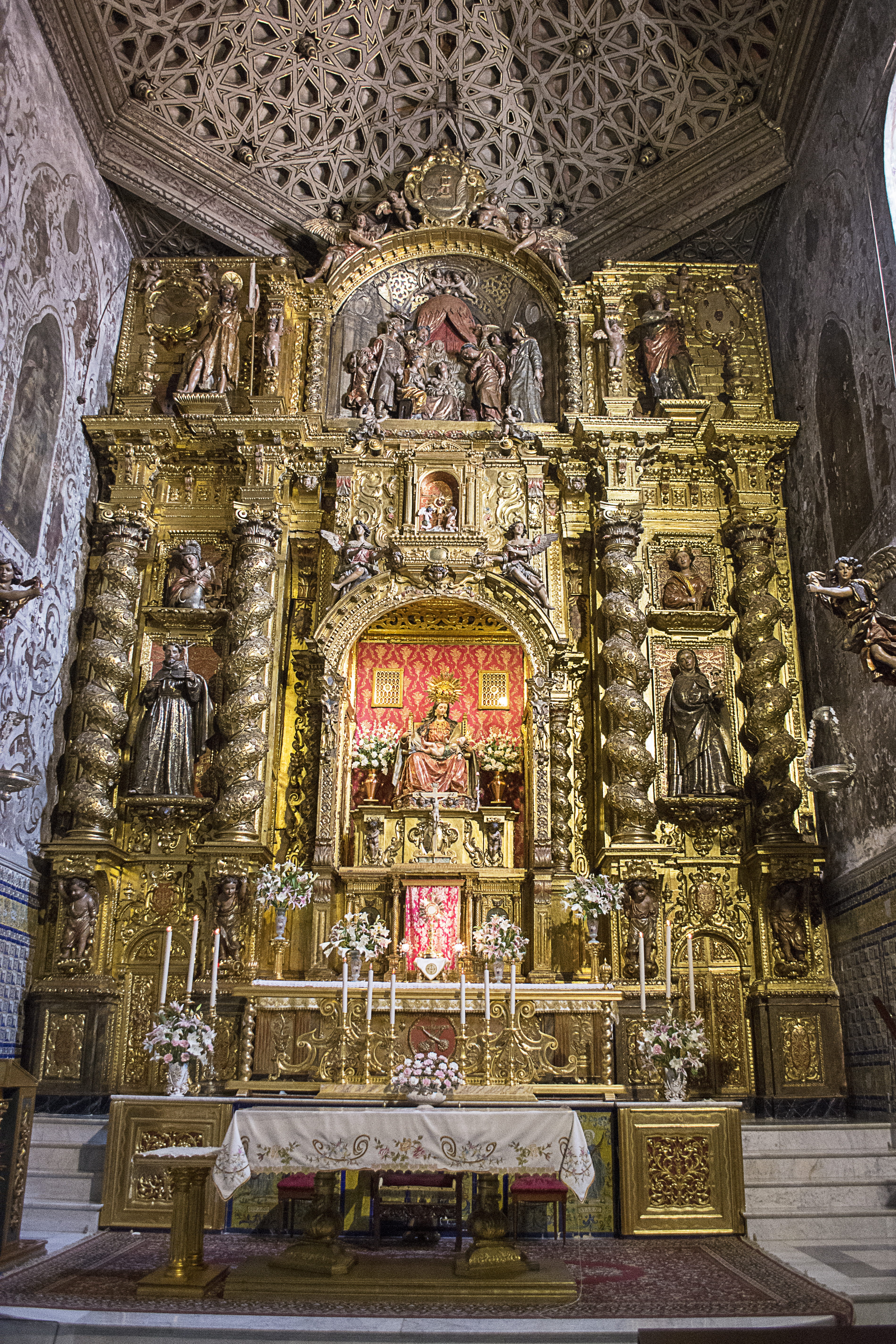 Retablo de la iglesia del convento Santa María de Jesús, en Sevilla. Obra del ensamblador Cristóbal de Guadix y las figuras de Pedro Roldán, finales del siglo XVII